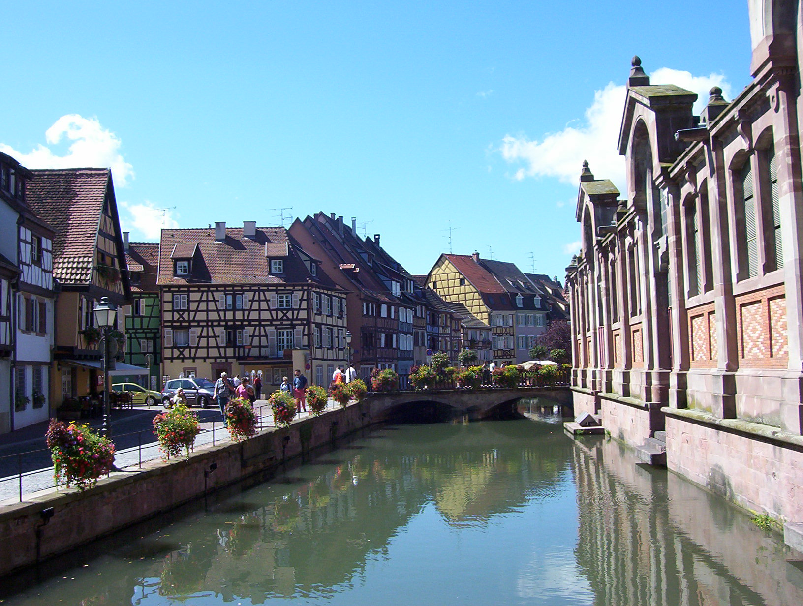 Colmar France - Petite Venise et Marché couvert